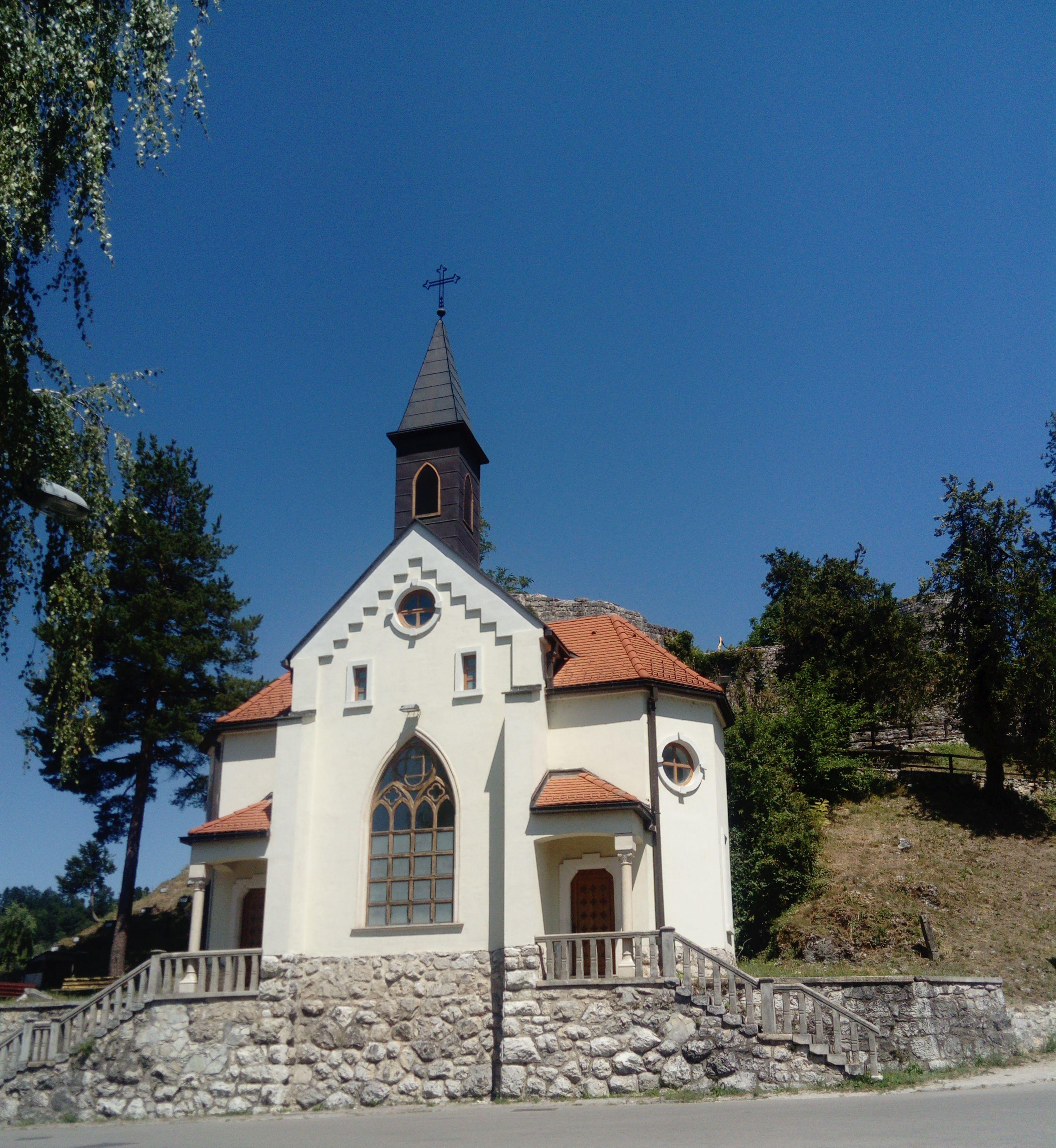 Filijalna crkva Blažene djevice Marije u Bosanskoj Krupi